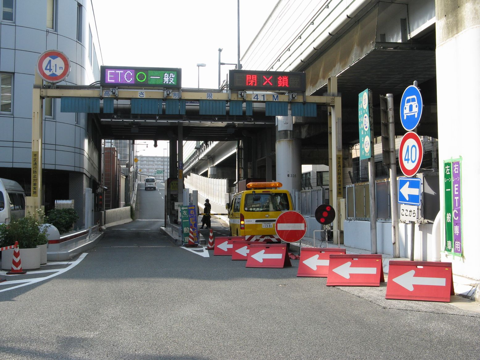 阪神高速えびす町入口 西望